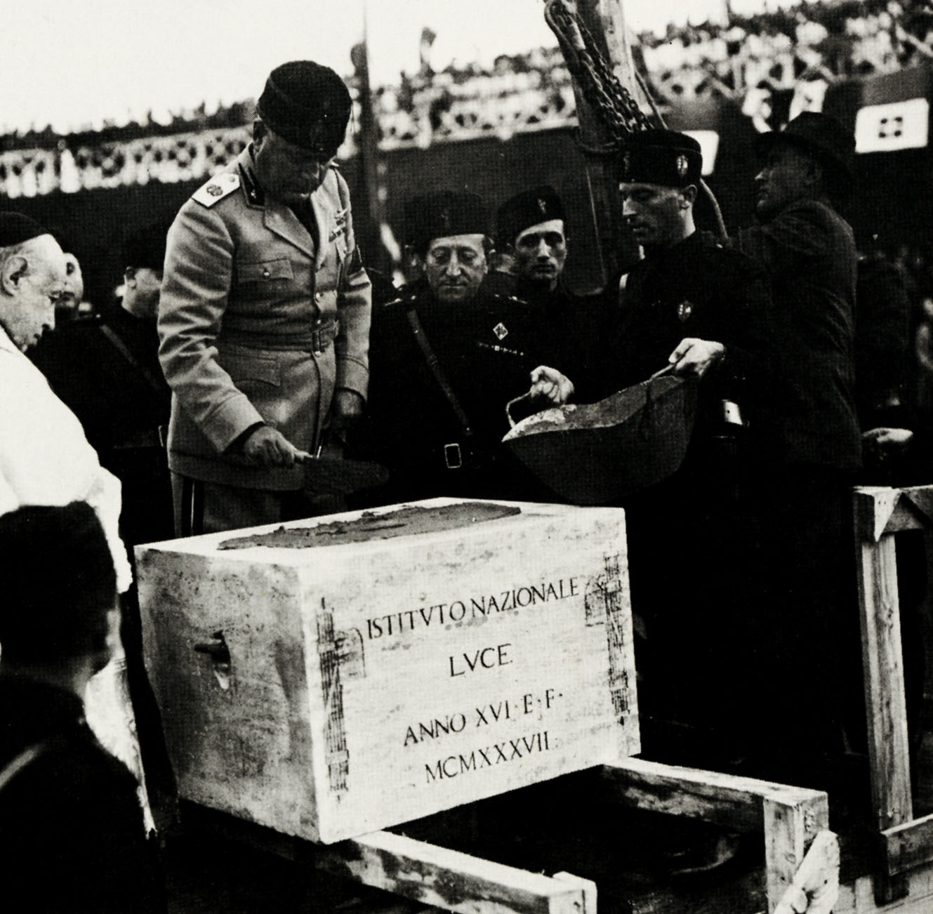 Il Duce colloca la prima pietra al LUCE a Roma